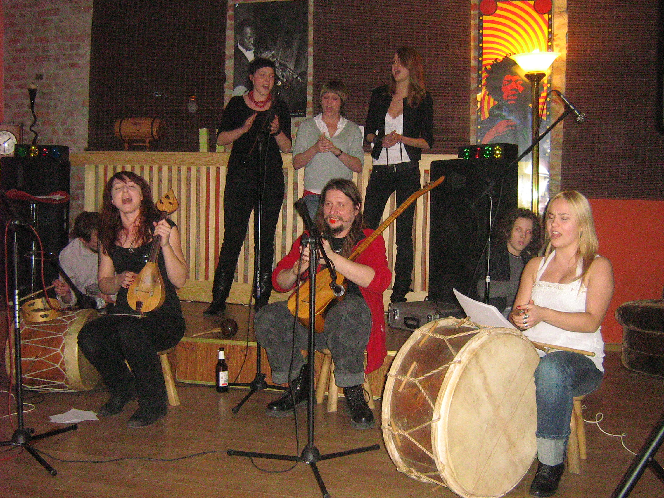 Percival Schuttenbach we wspólnym projekcie z wolińskim zespołem Gędźba pod nazwą "Perciba"